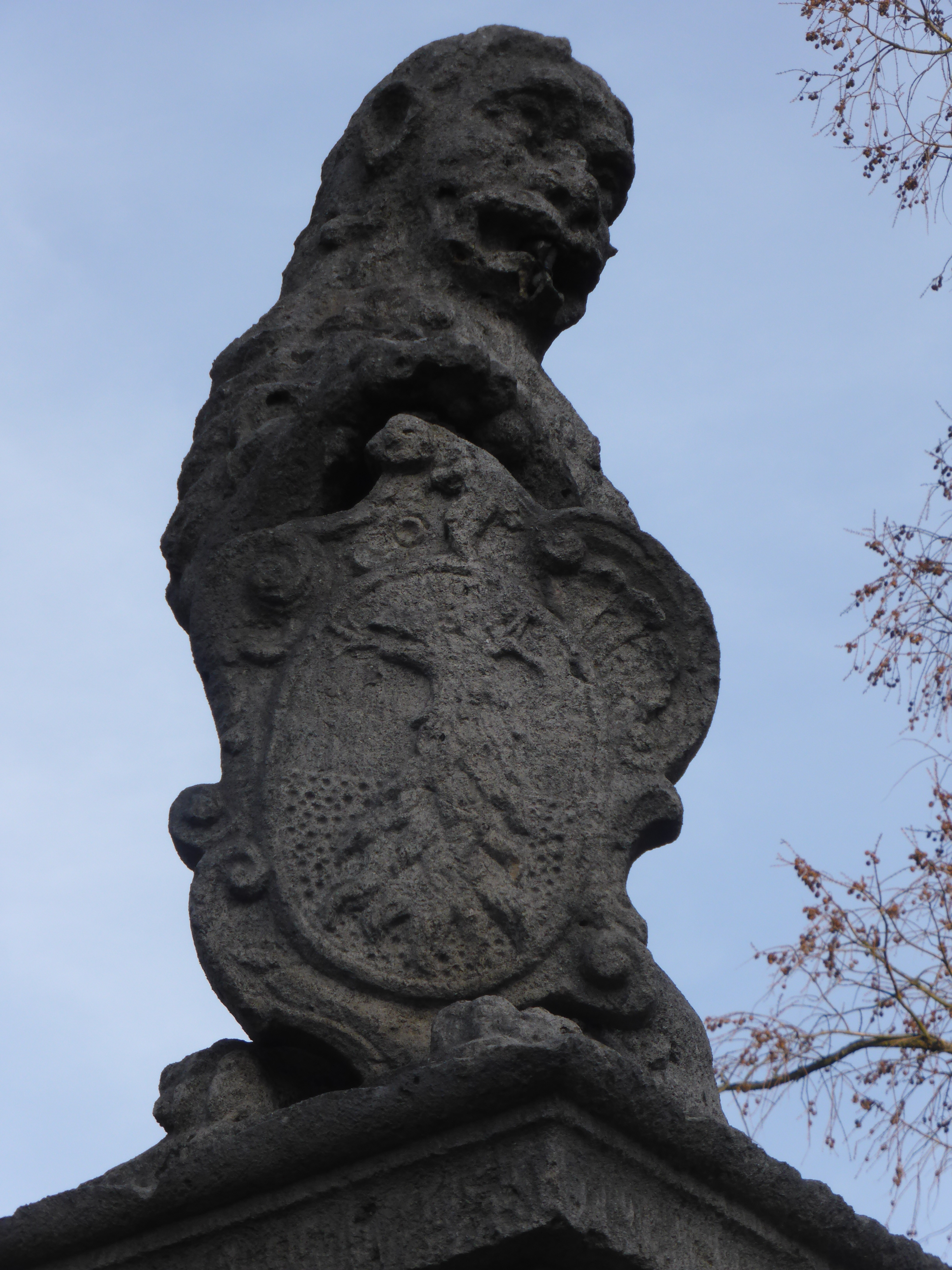 Neues Schloss Teublitz (Teublitz)